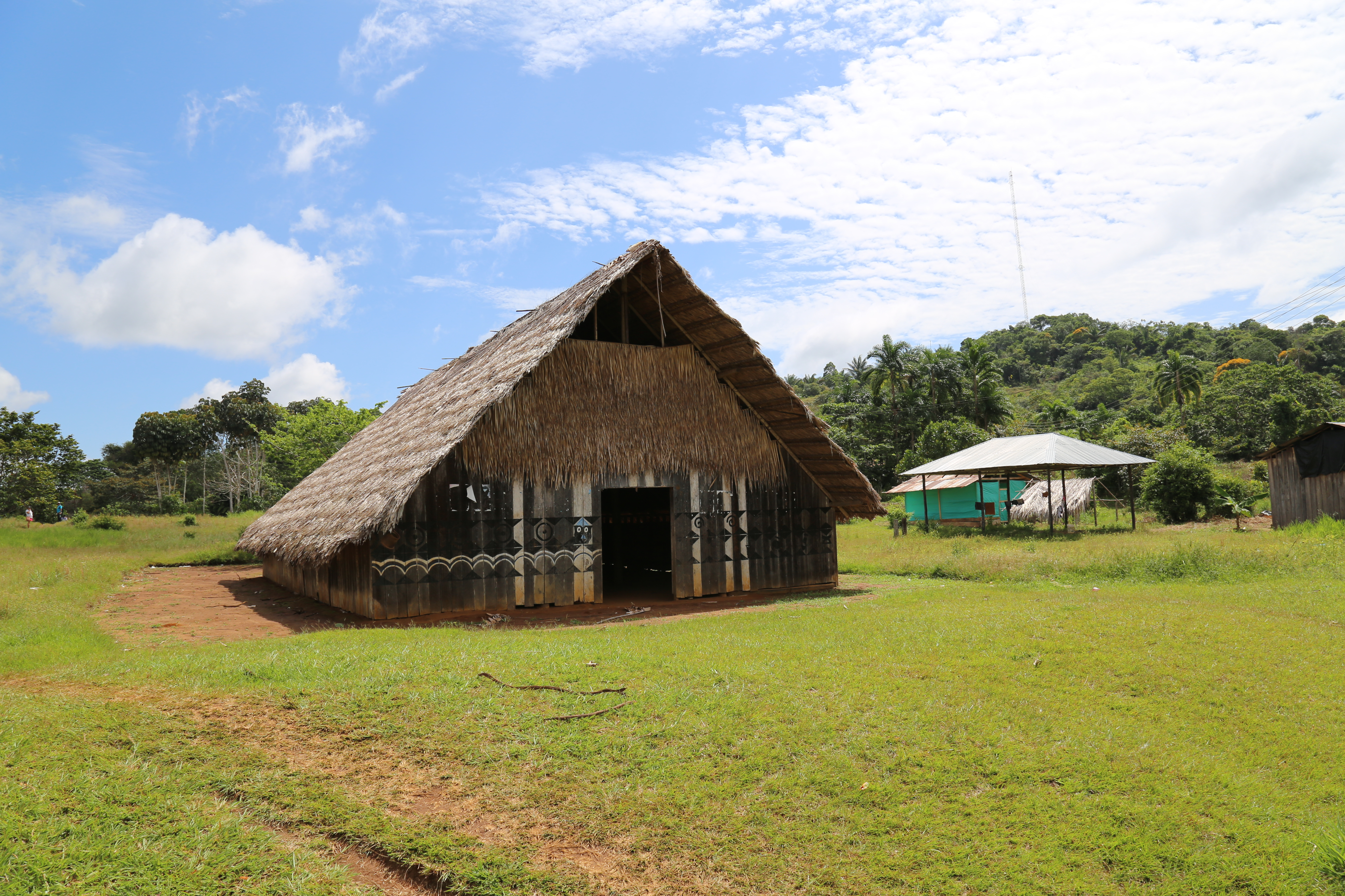 Maloca indígena Mituseño